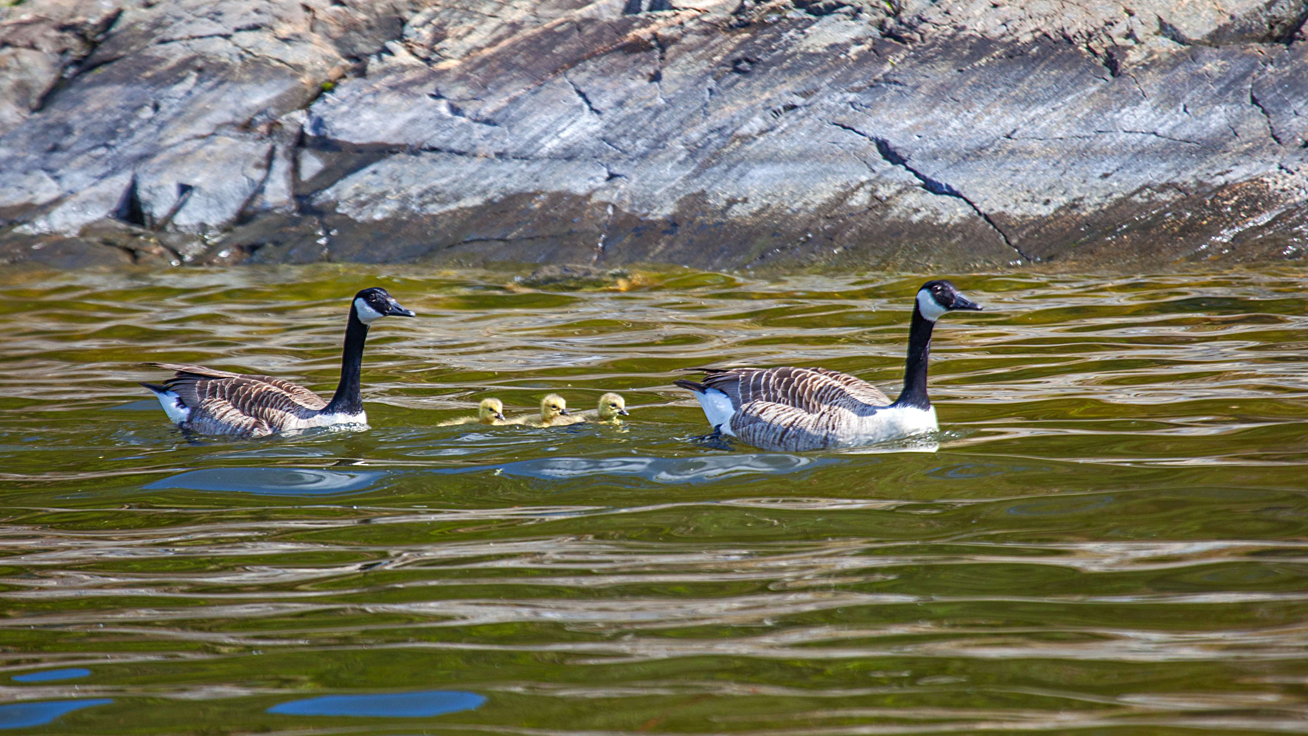 Kanadagås, Canada goose, Branta canadensis, Vaxholm, Stockholm, Sweden